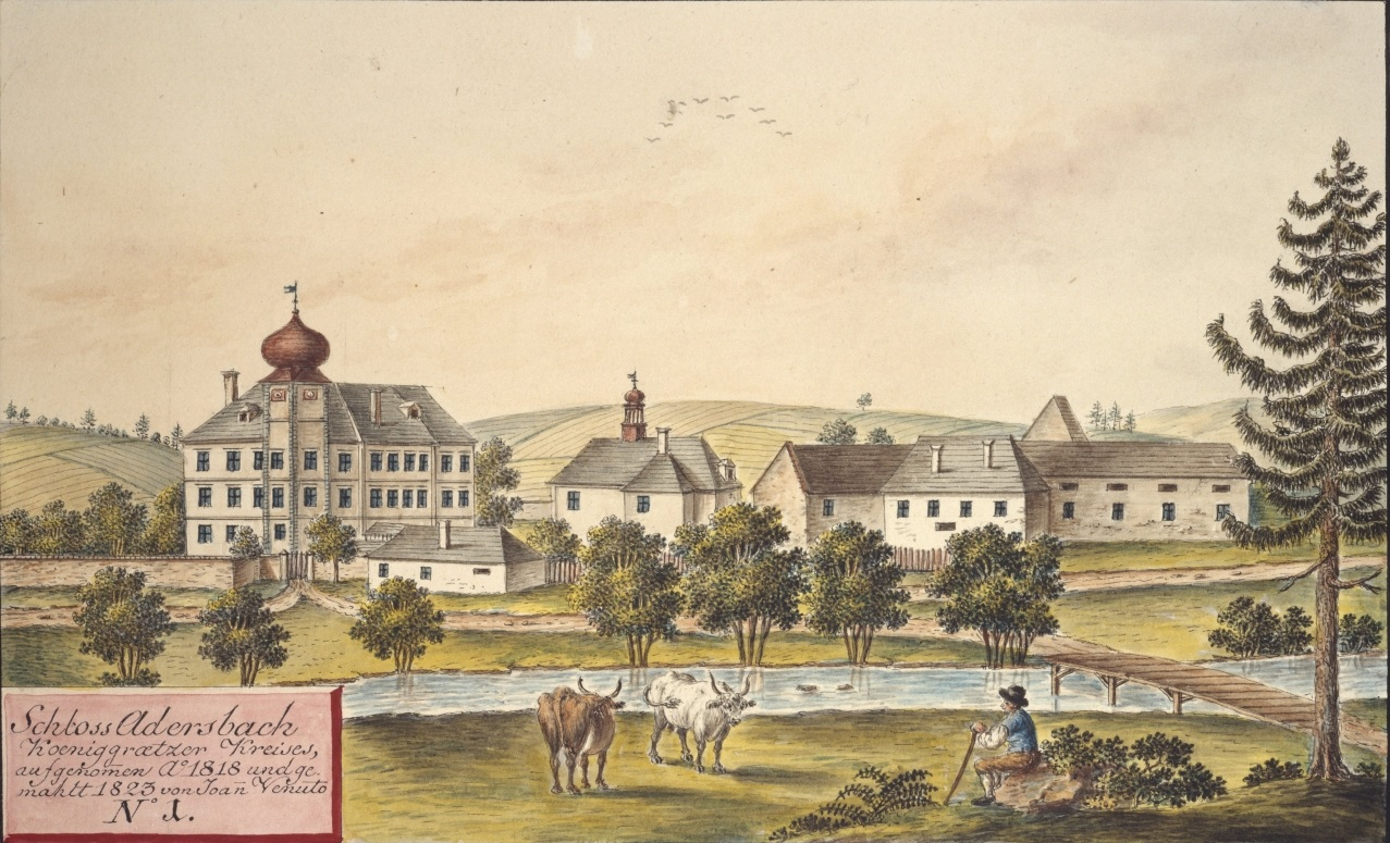 Adršpach. Schloss Adersbach Koeniggraetzer Kreises, aufgenommen Ao 1818 und gemahlt 1823 von Joan Venuto